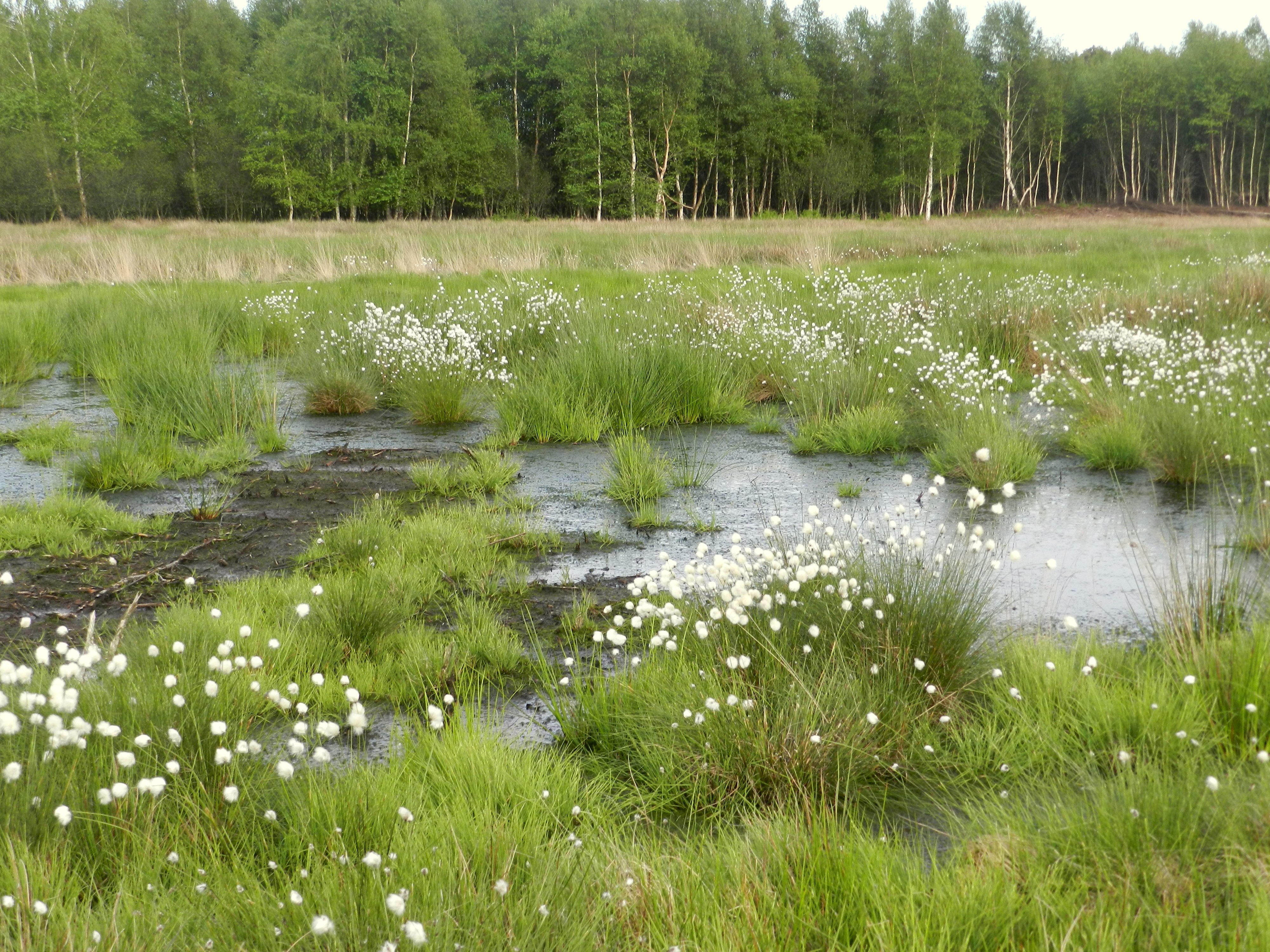 Wollgräser im NSG Diepholzer Moor